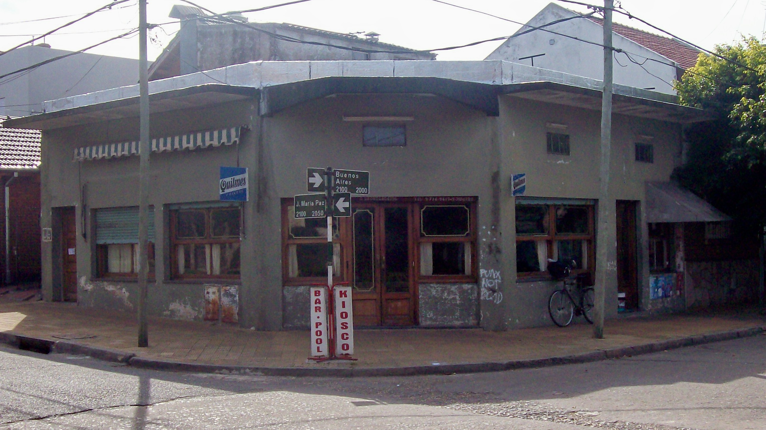 Bar en José María Paz y Buenos Aires (Olivos cabecera del partido de Vicente López, provincia de Buenos Aires, Argentina.) en que se filmaron escenas de la serie "Los cuentos de Fontanarrosa", basada en el libro de Roberto Fontanarrosa.)